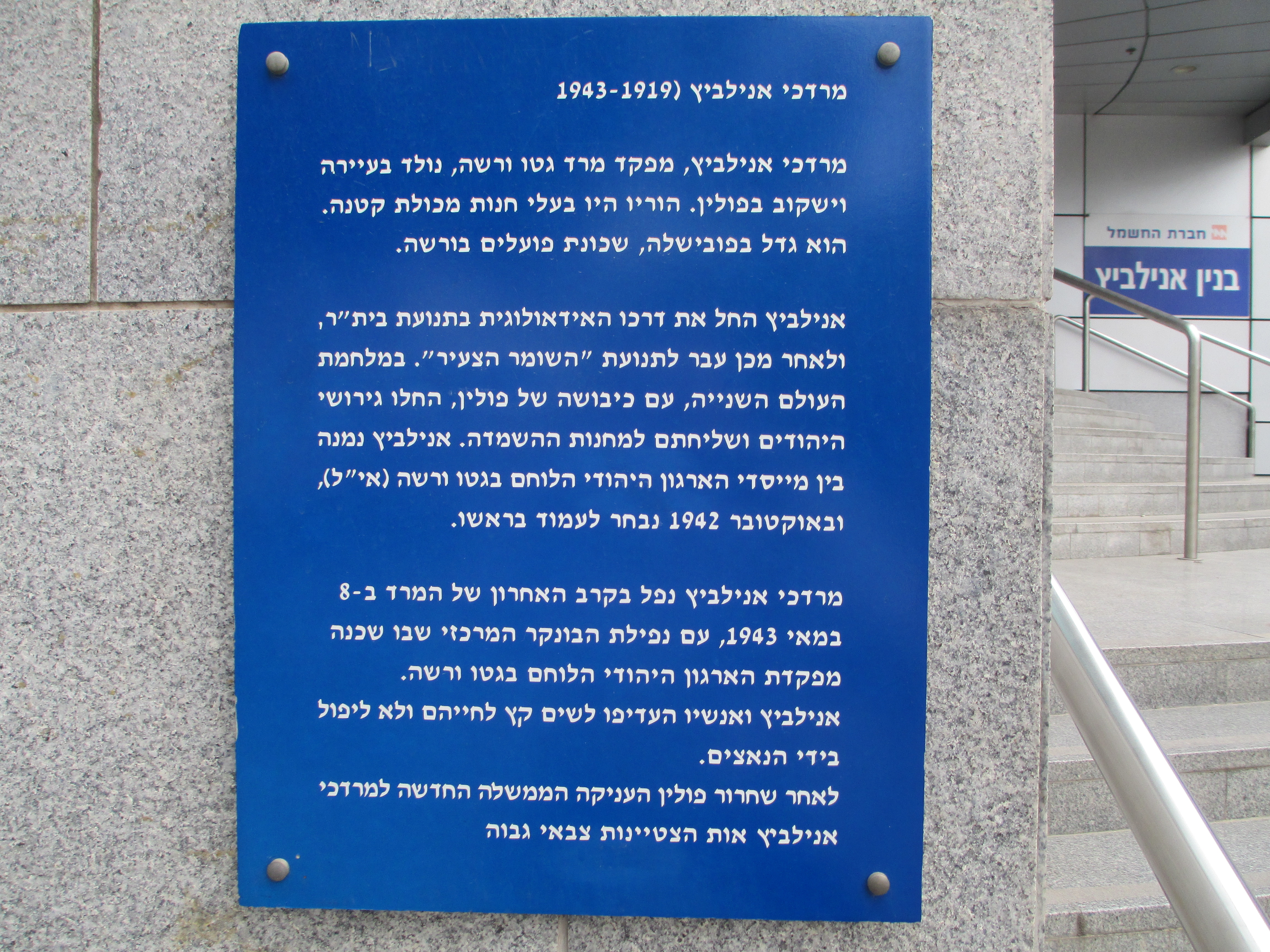 לוחית זיכרון למרדכי אנילביץ' בתל אביב